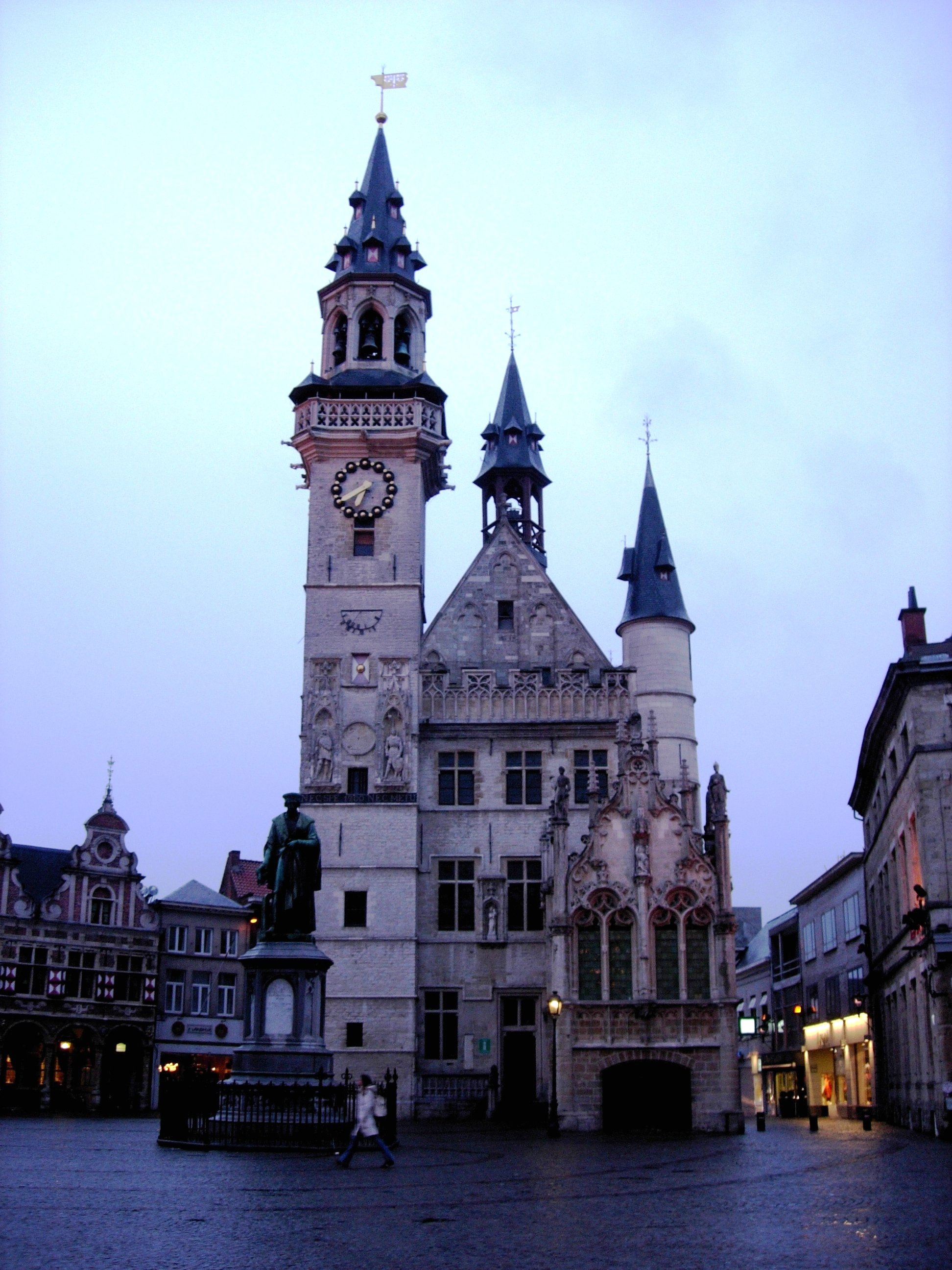 [Aalst, Belgium]